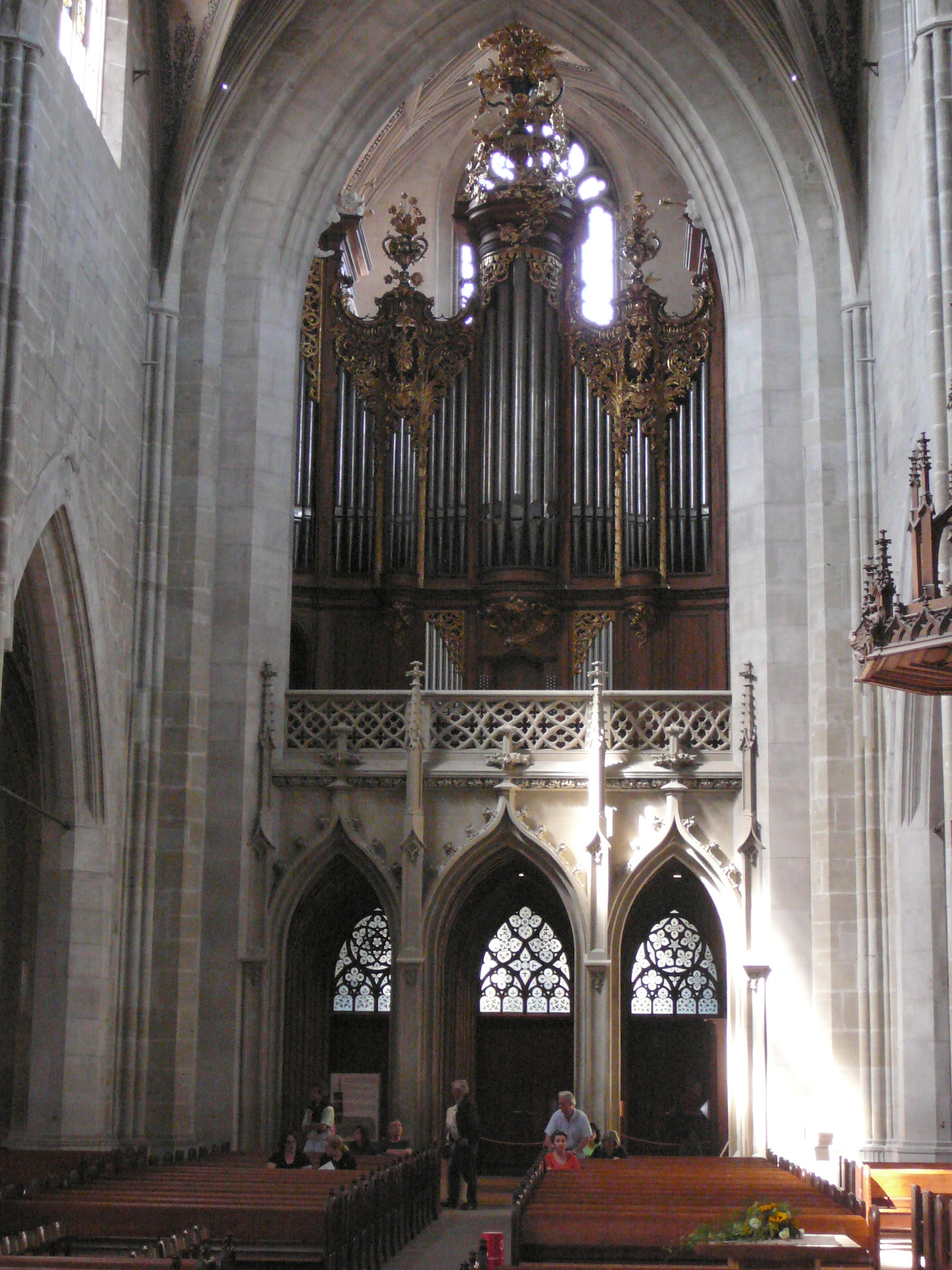 Orgue de la cathédrale St Vincent de Berne